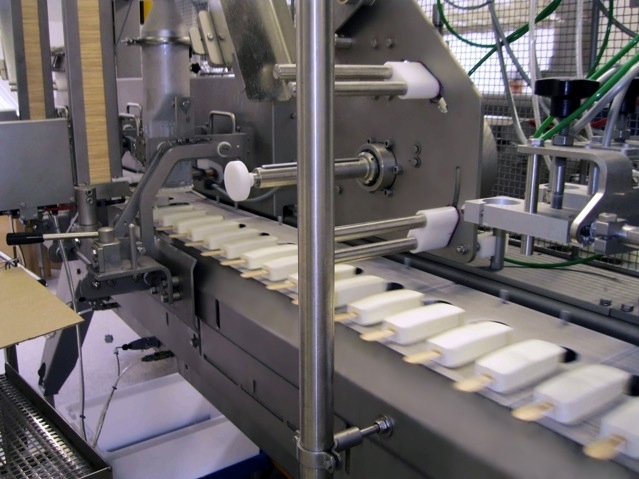 Balbiino pulgajäätised uuel liinil